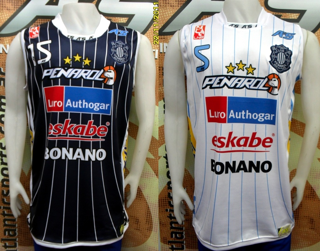 Camiseta Local y Visitante de Peñarol de Mar del Plata